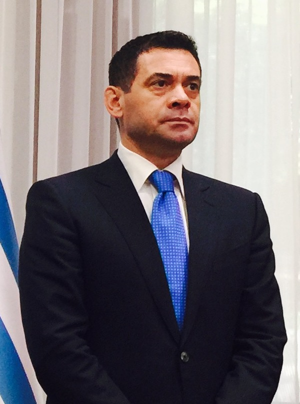 Ο Υπουργός Εξωτερικών Νίκος Κοτζιάς μετά το πέρας των διευρυμένων συνομιλιών των δύο αντιπροσωπειών, με τον Υπουργό Εξωτερικών της Αλβανίας Ditmir Bushati και Υπουργό Οικονομίας Arben Ahmetaj, Τίρανα 15.7.15